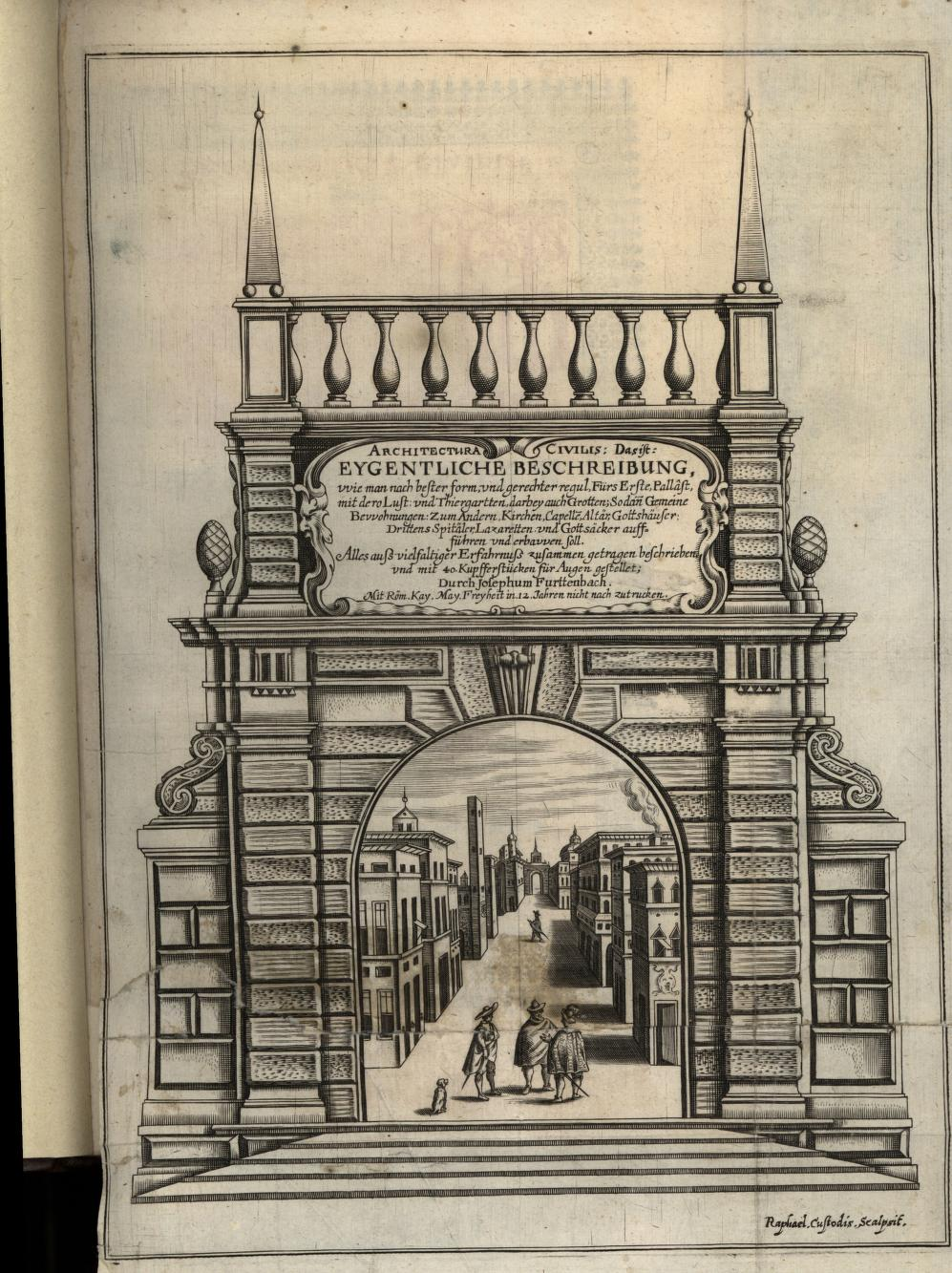 Titelblatt des Werkes ARCHITECTURA CIVILIS von Joseph Furttenbach, in Kupfer gestochen von Raphael Custos und 1628 veöffentlicht.